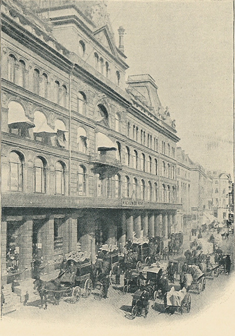 Magasin du Nords vogne rykker ud om morgenen omkring år 1900